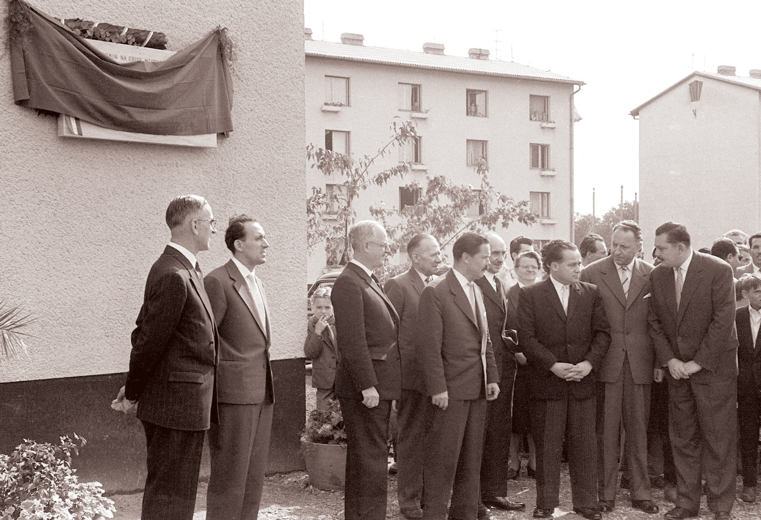 Poimenovanje delavskega naselje MTT na pobreškem platoju v naselje Greenwich ob obisku delegacije iz Greenwicha